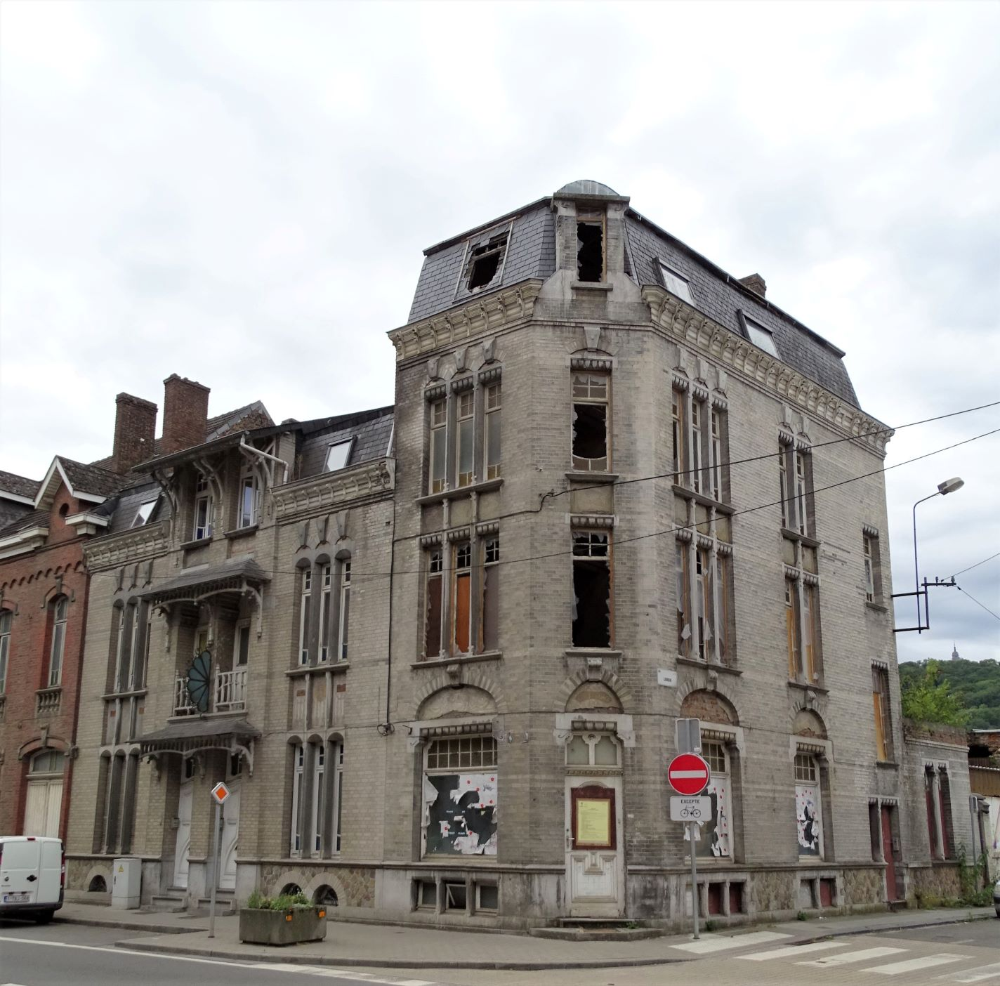 maison art nouveau à l'abandon depuis des années ( arch. A. Ledoux, sgraffites P. Cauchie )